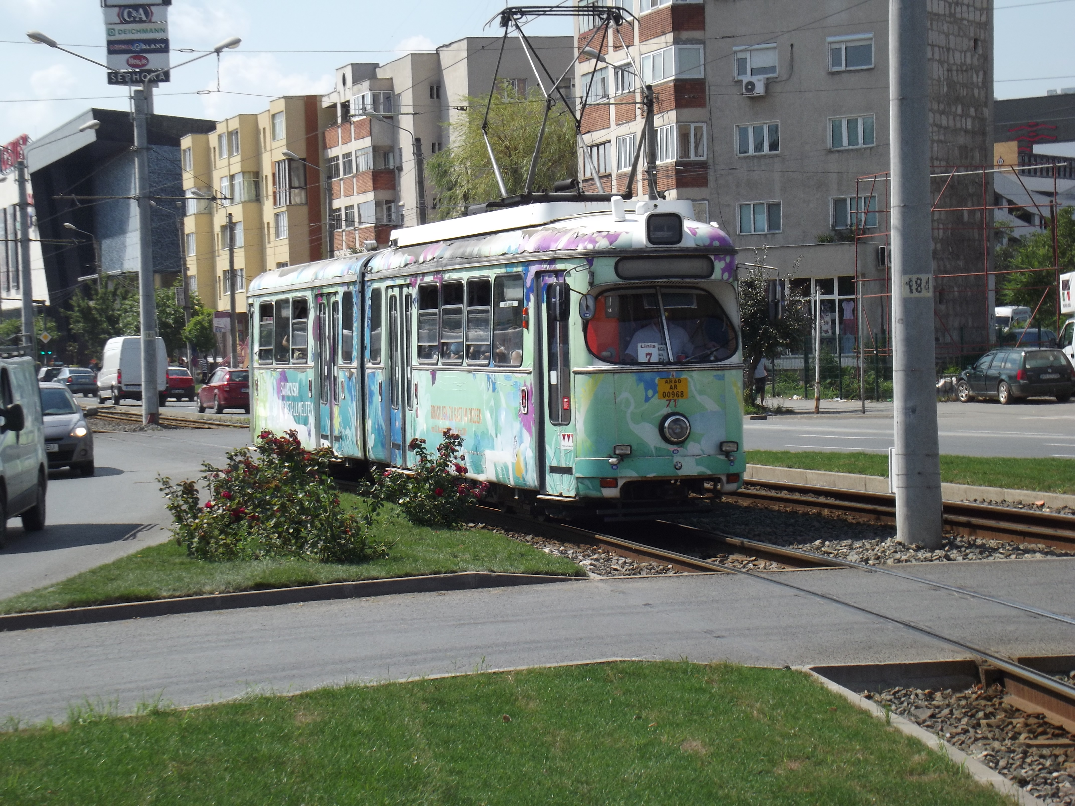 Duwags trams in Arad, Roemenia